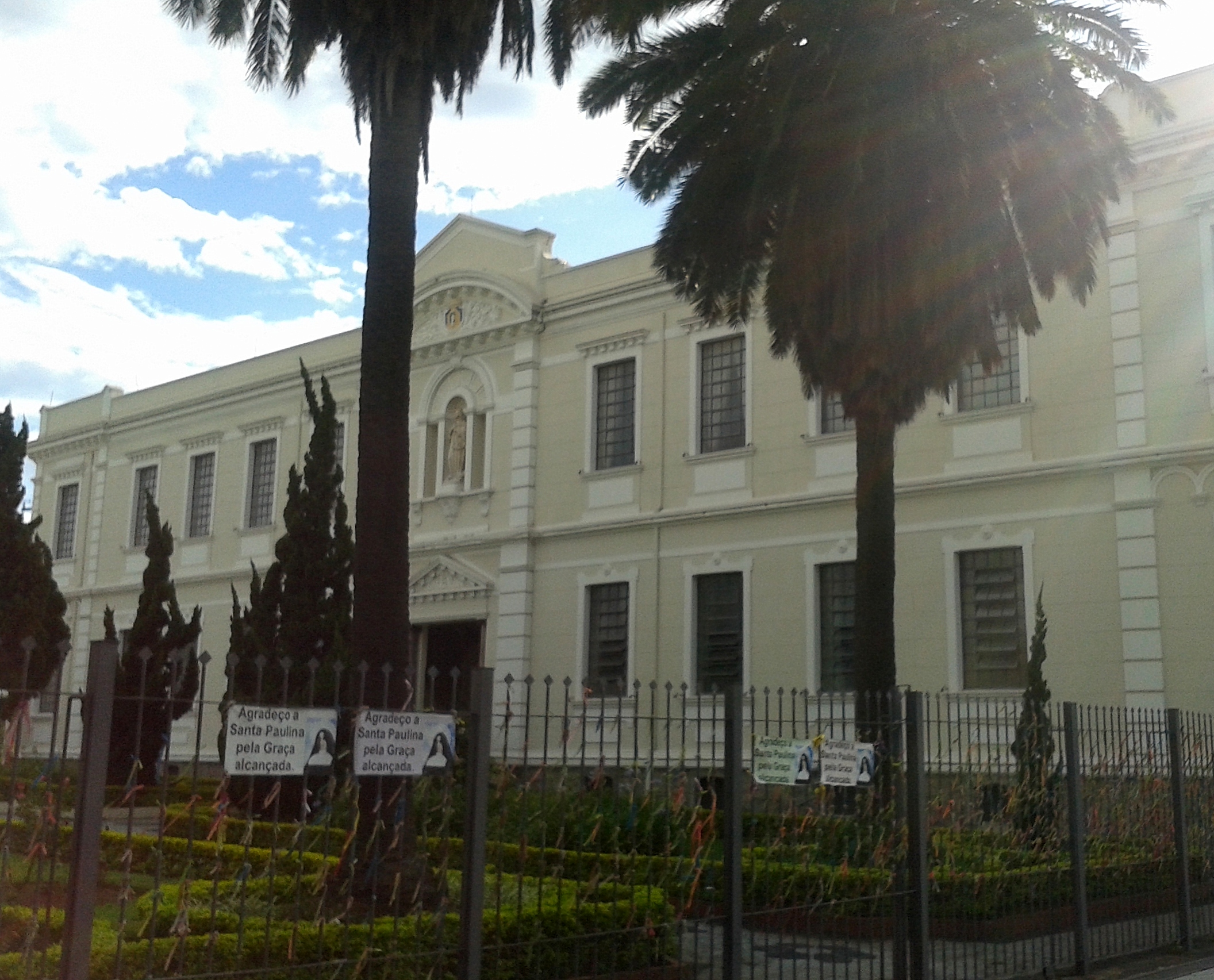 Educandário Sagrada Família. Ipiranga, São Paulo, SP, Brasil.